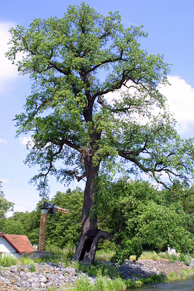 Kacerenský dub na hrázi rybníka Kacerna.